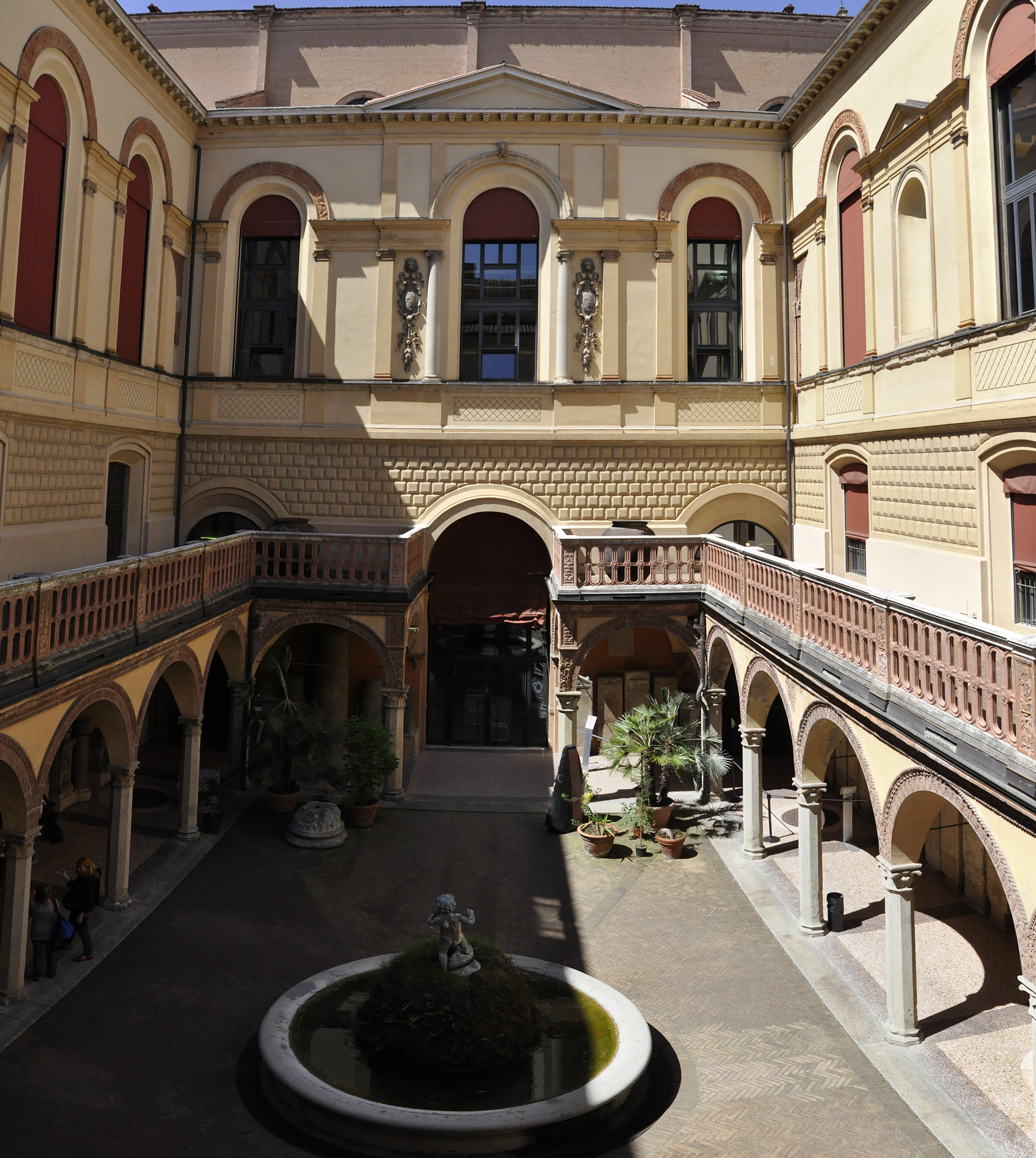 Het binnenhof van het Museo Civico Archeologico te Bologna